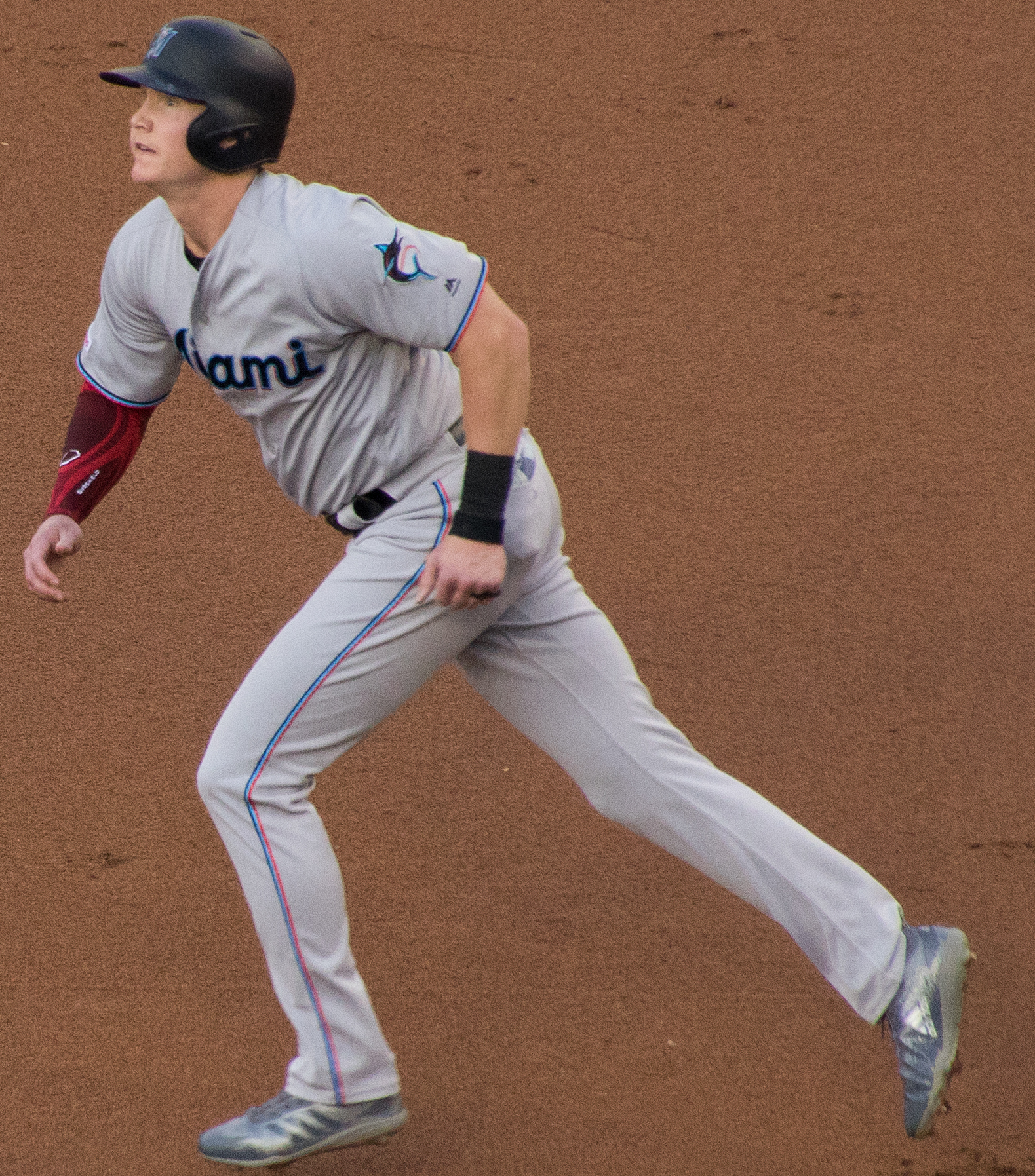 Garrett Cooper